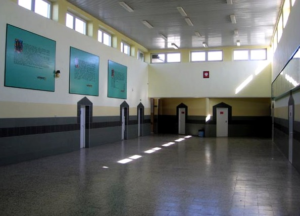 Wnętrze szkoły w Wolanowie